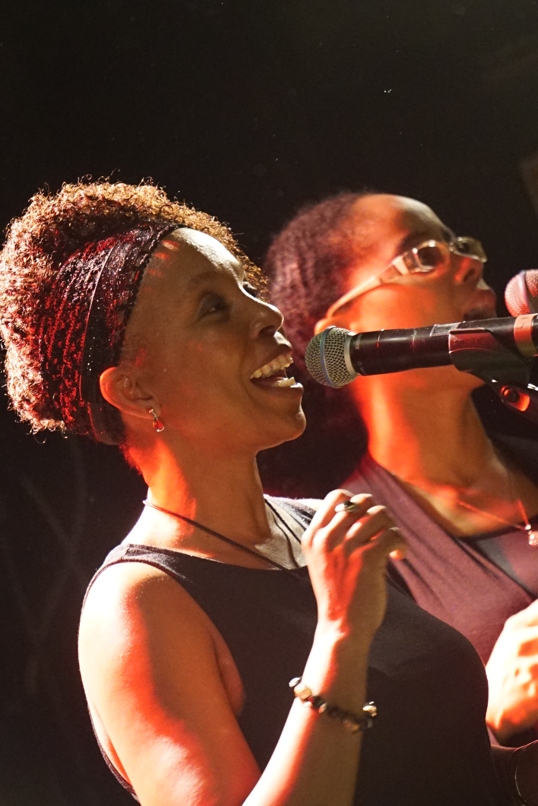 concert à la Cartonnerie.